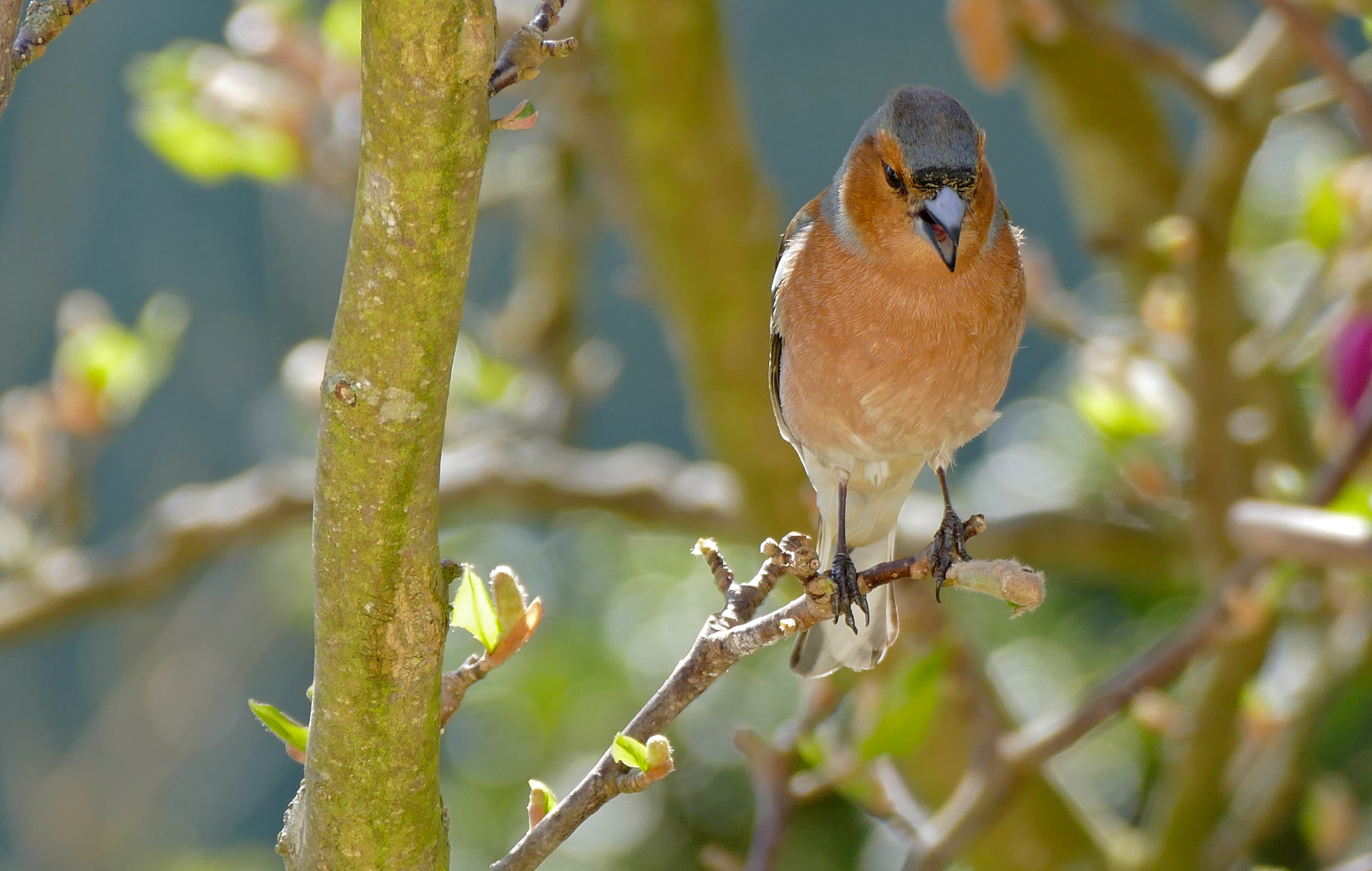 La Ferté-Macé, Orne, FRANCE